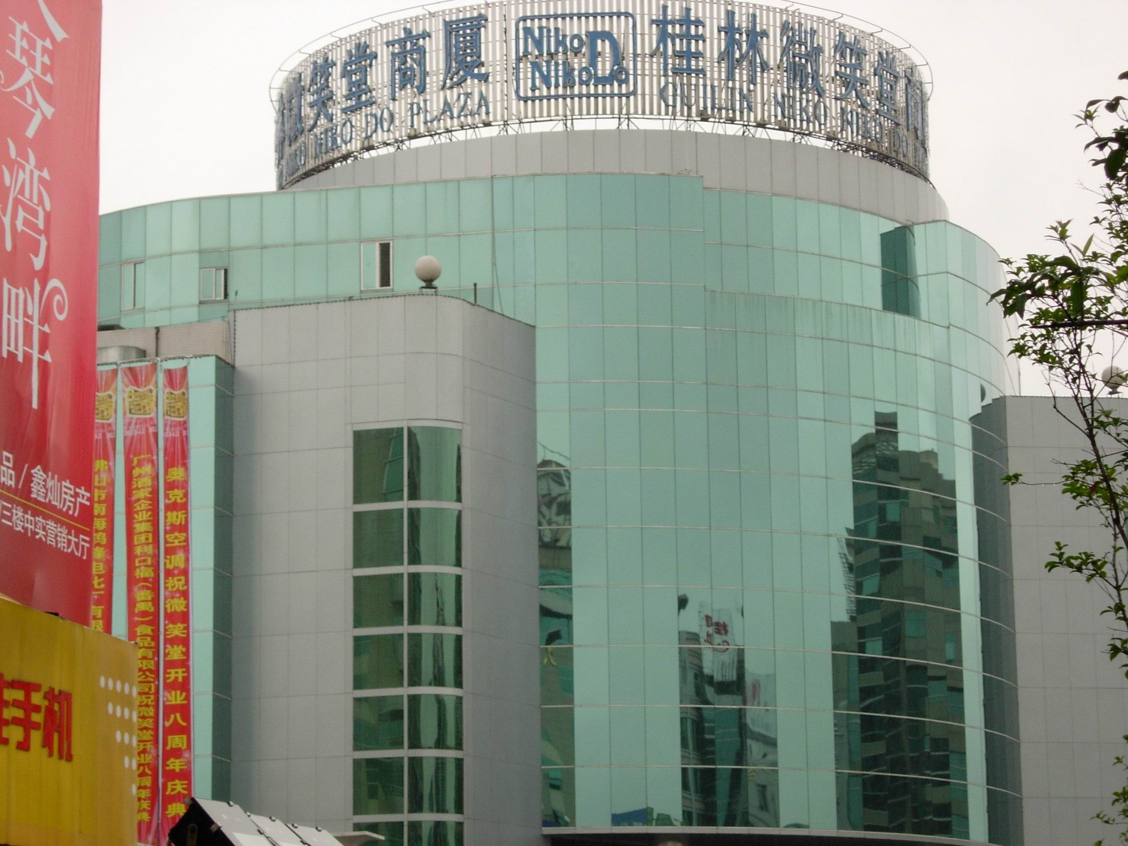 中文（中国大陆）: 桂林微笑堂商厦